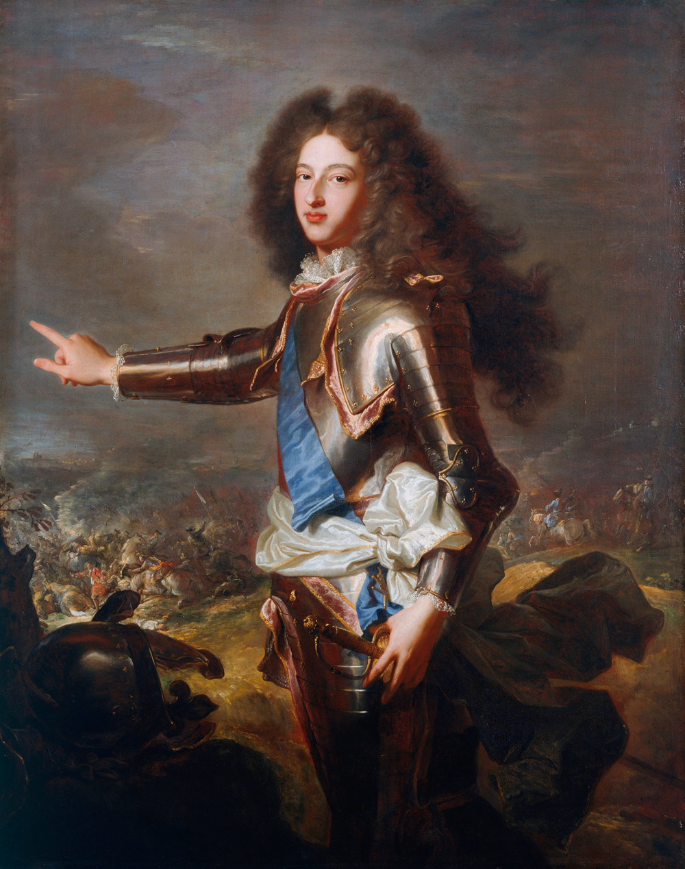 Louis de Bourbon, dauphin de Viennois, duc de Bourgogne; Öl auf Leinwand, English Heritage Kenwood